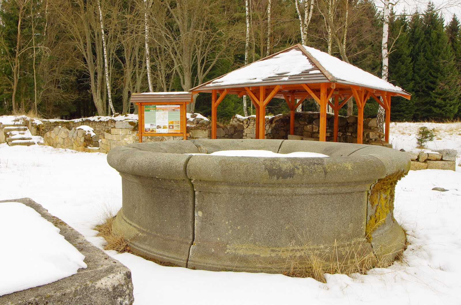 Novoveská kyselka, Slavkovský les, okres Sokolov; více